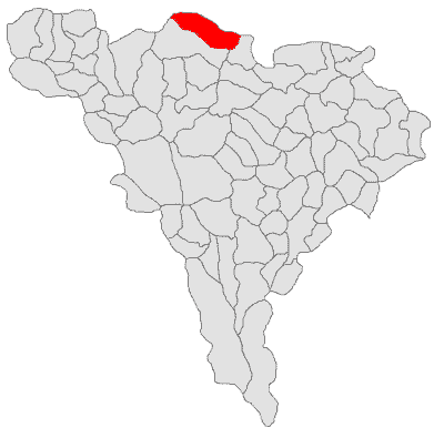 Categorie:Hărţi ale judeţului Alba